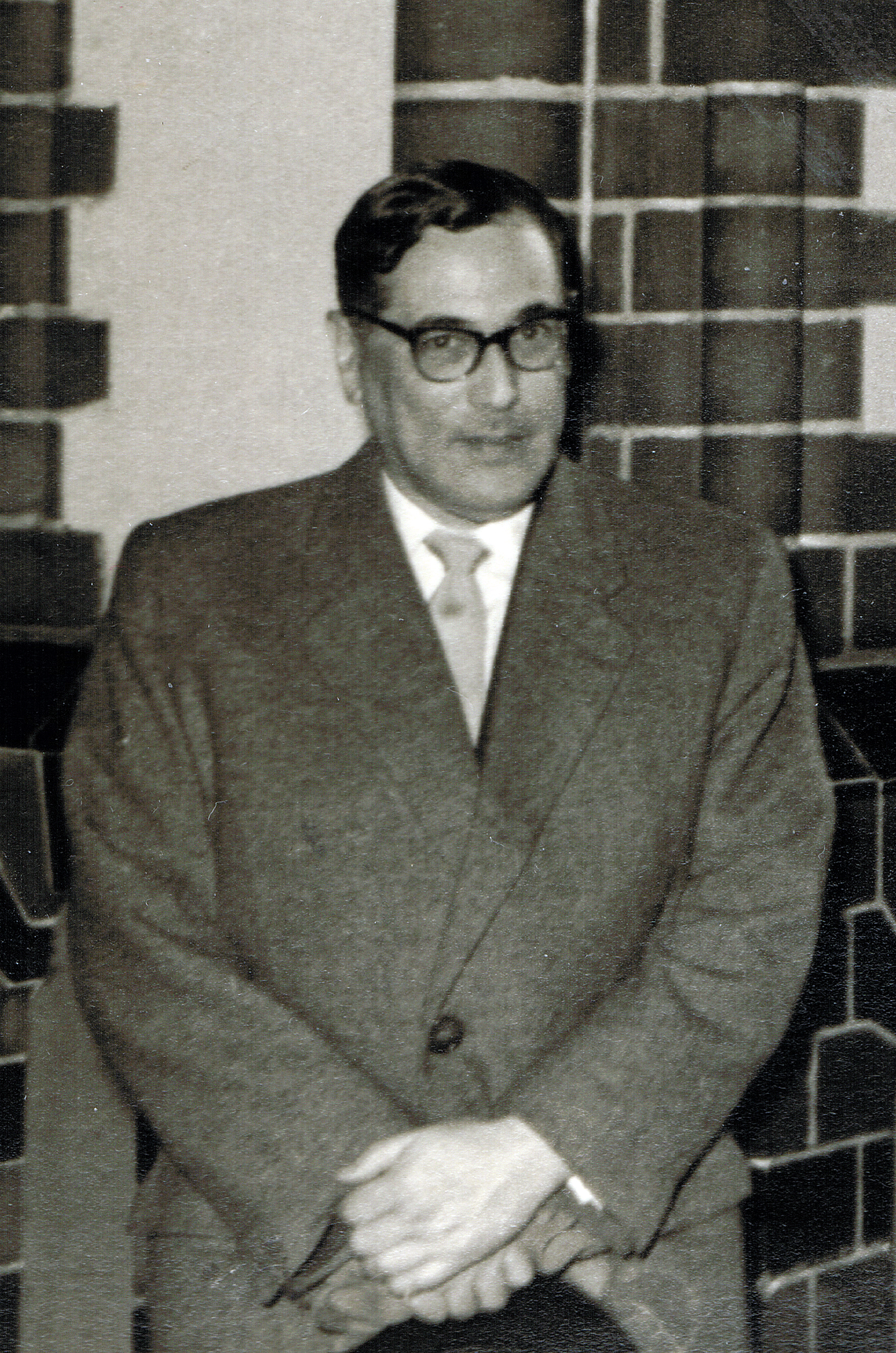 Rechtsanwalt Walter Schwarz in Berlin 1958